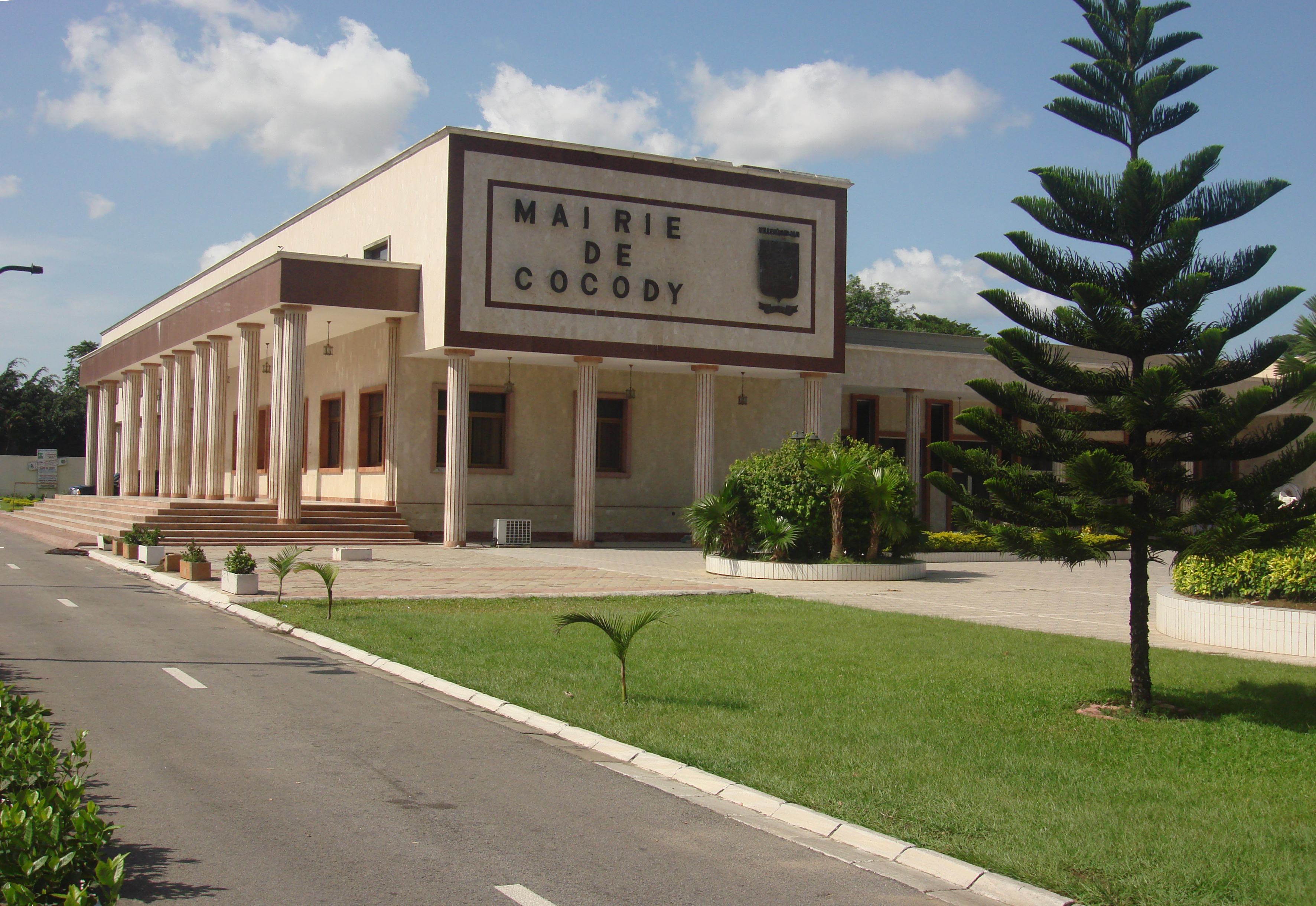 Hotel communal de Cocody à Abidjan (Côte d'Ivoire)